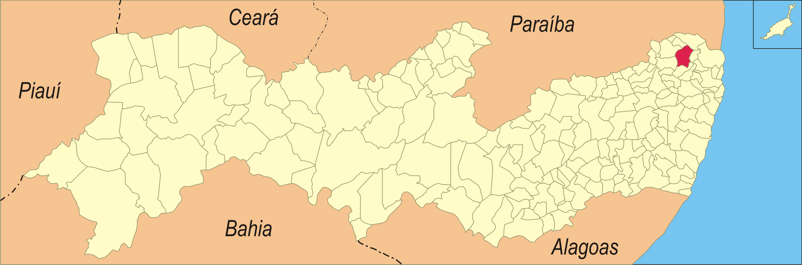 Localização da cidade no estado de Pernambuco